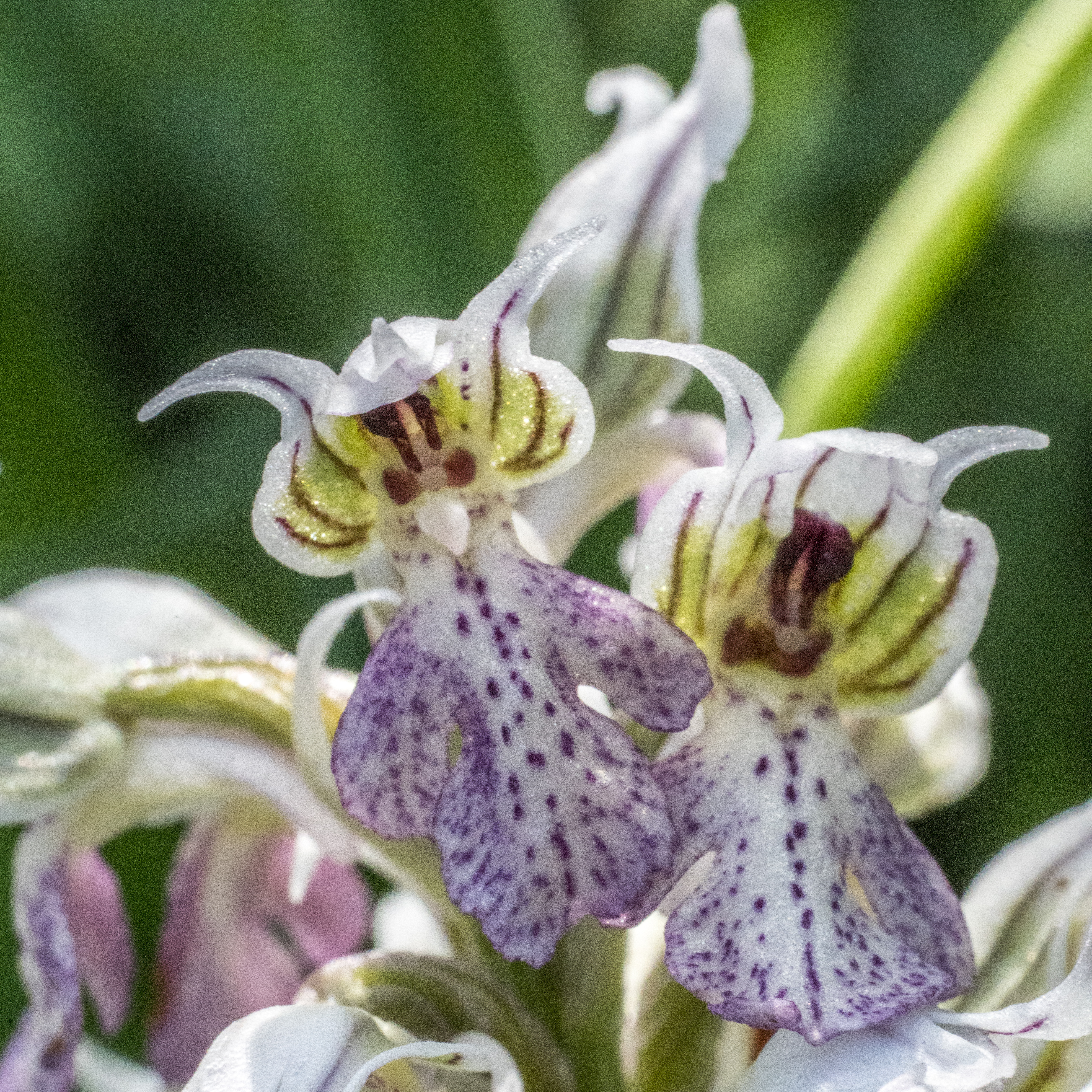 Neotinea lactea, Kreta